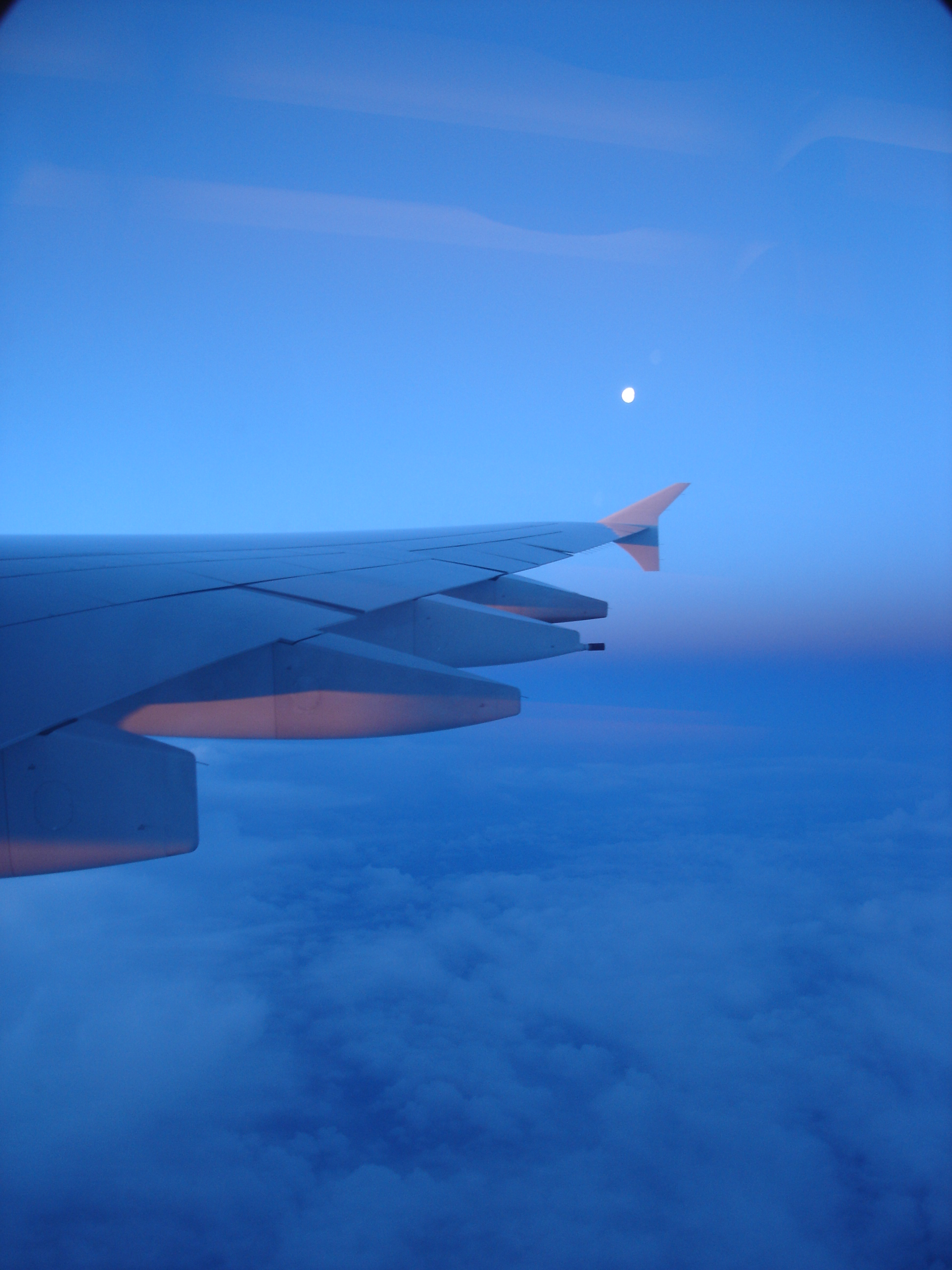 Foto hecha desde un A380 de la compañía Air France volando al amanecer sobre el Océano Atlántico.